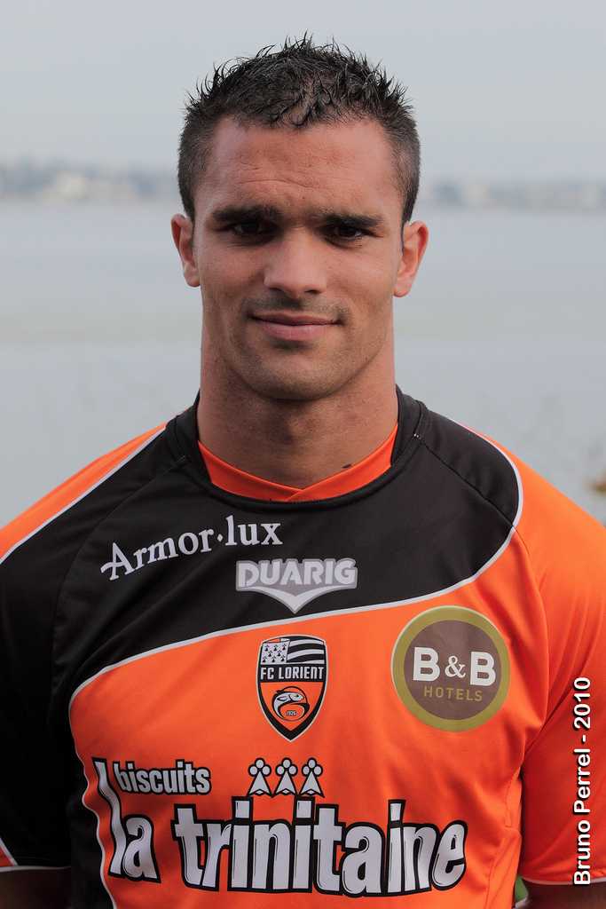 Jérémy Morel, joueur de l'équipe de football du FC Lorient en 2010.